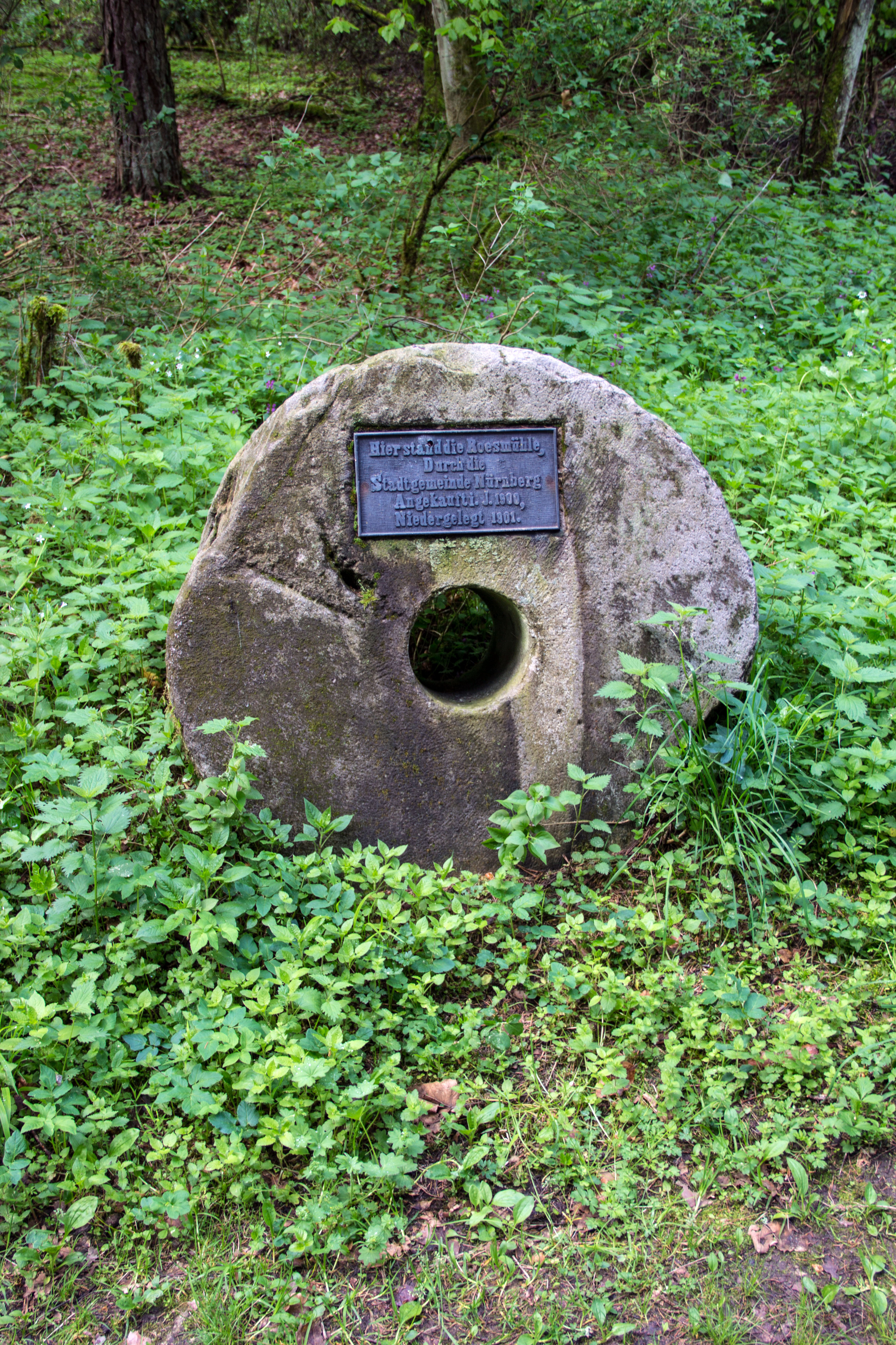 Urspringtal Mühlenstein